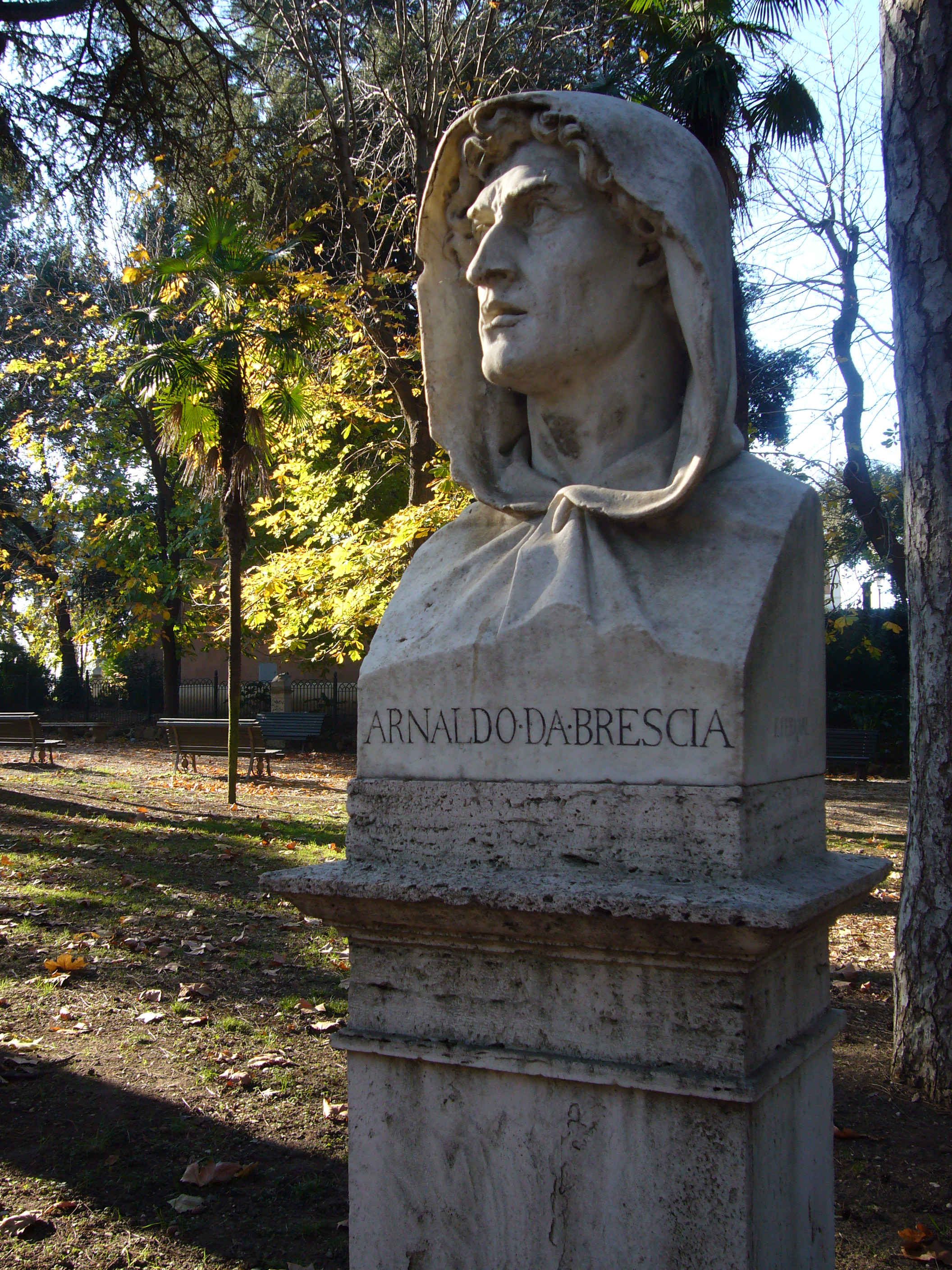 Roma, busto di Arnaldo da Brescia, scolpito da G. Marini nel 1871, al Pincio (Villa Borghese).